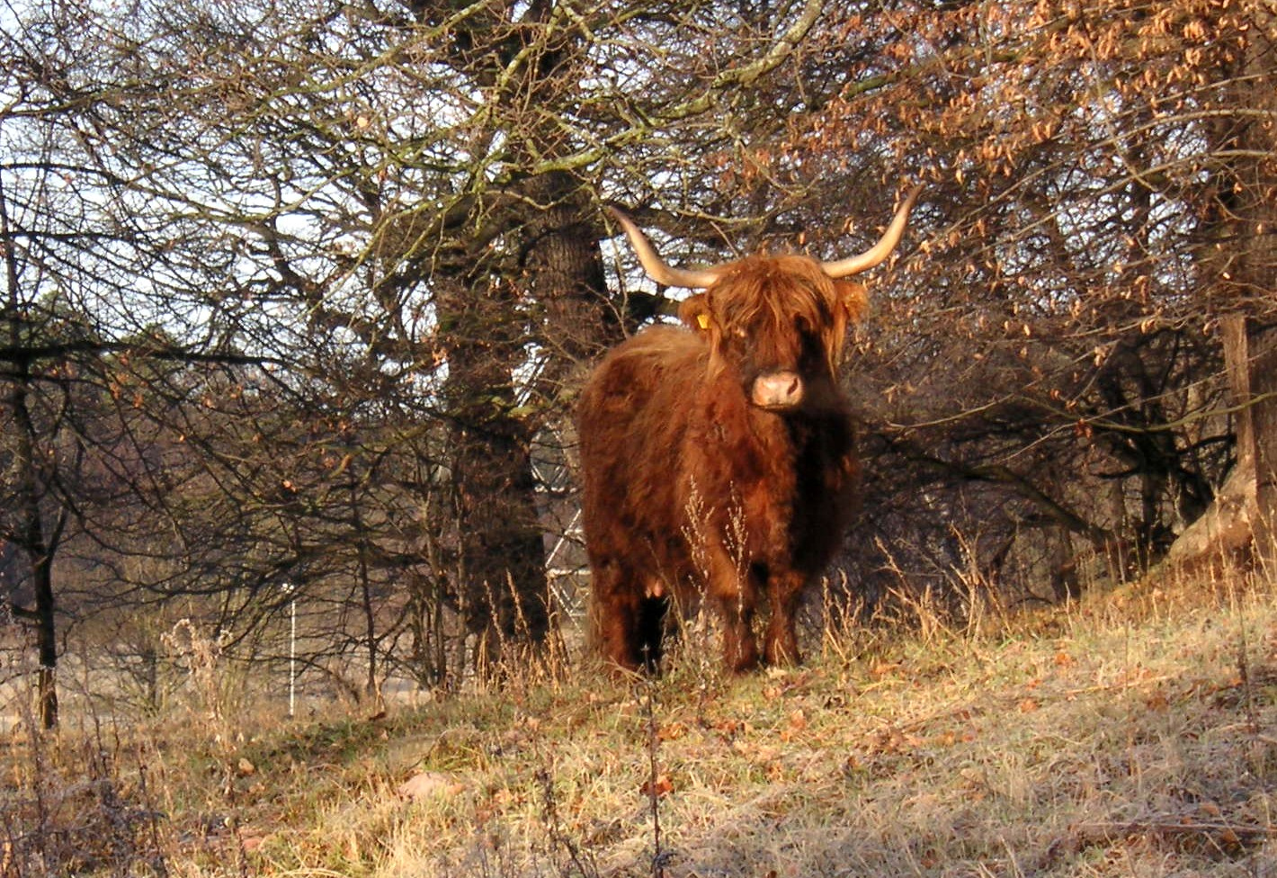 Fisksjöäng på Norra Djurgården i Stockholm, Highland cattle